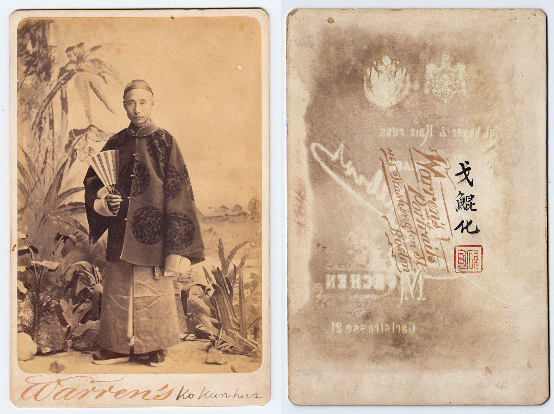 Ko K'un-hua, 1838-1882